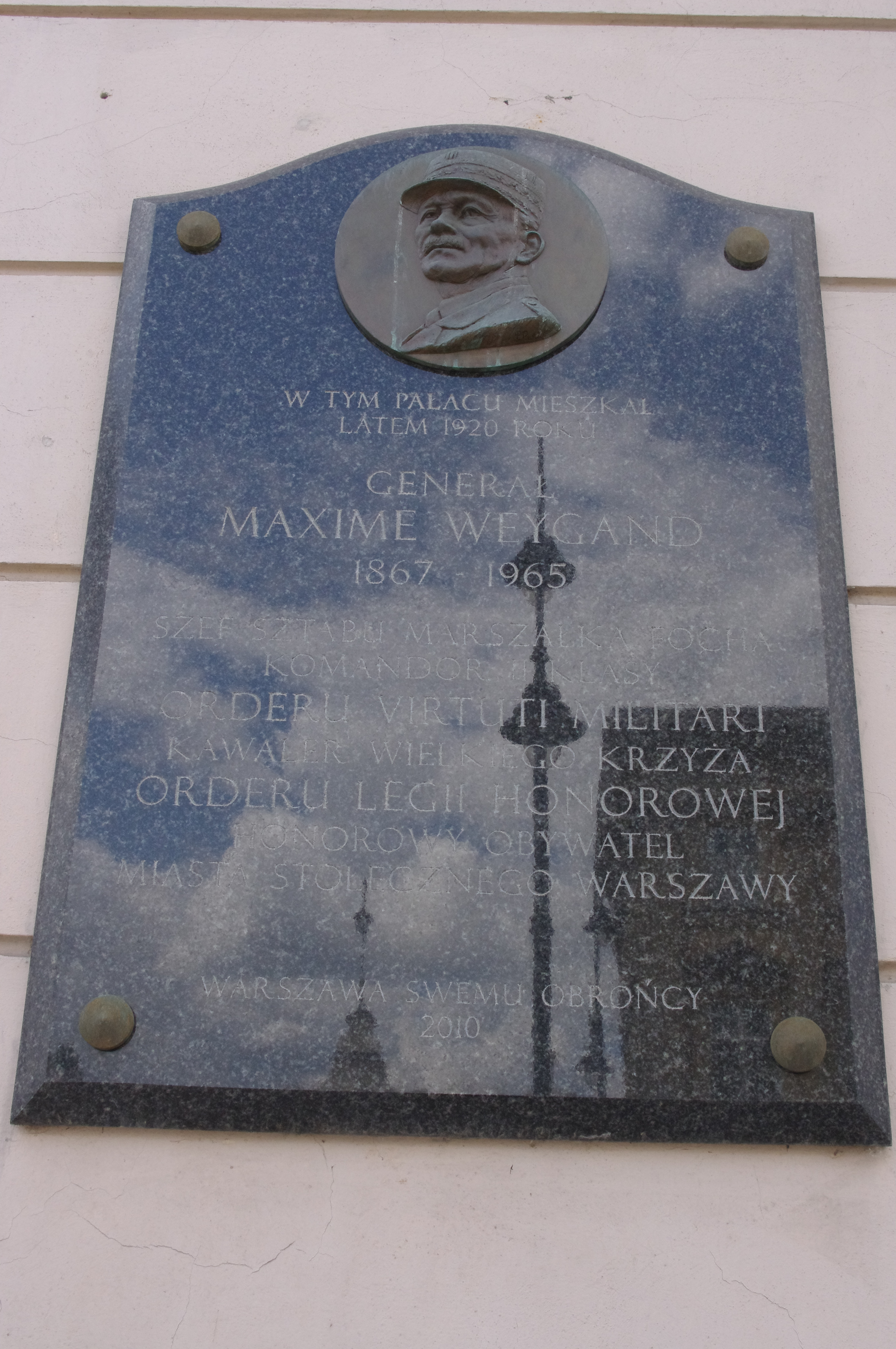 Tablica upamiętniająca gen. Maxima Weyganda na pałacu przy Krakowskim Przedmieściu 5 (budynek ASP) w Warszawie, gdzie latem 1920 r., mieszkał generał. Tablice wmurowano w 2010 r.